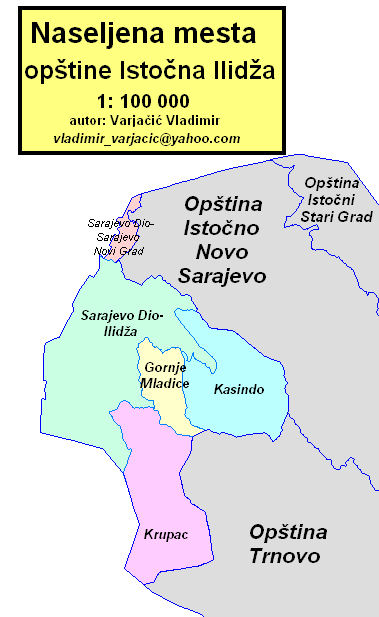 Opština Istočna Ilidža